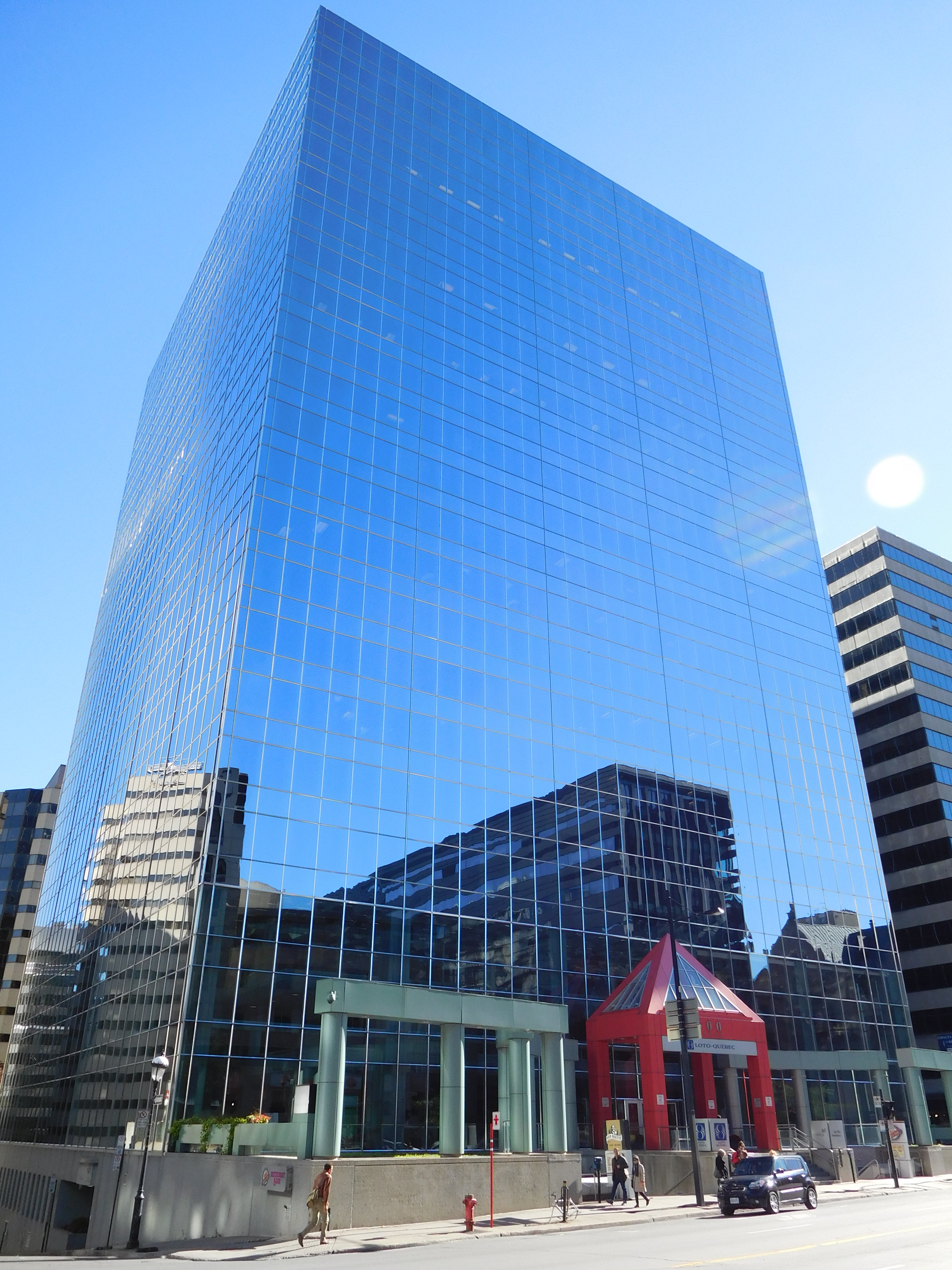 Édifice Loto-Québec, 500, rue Sherbrooke Ouest, Montréal